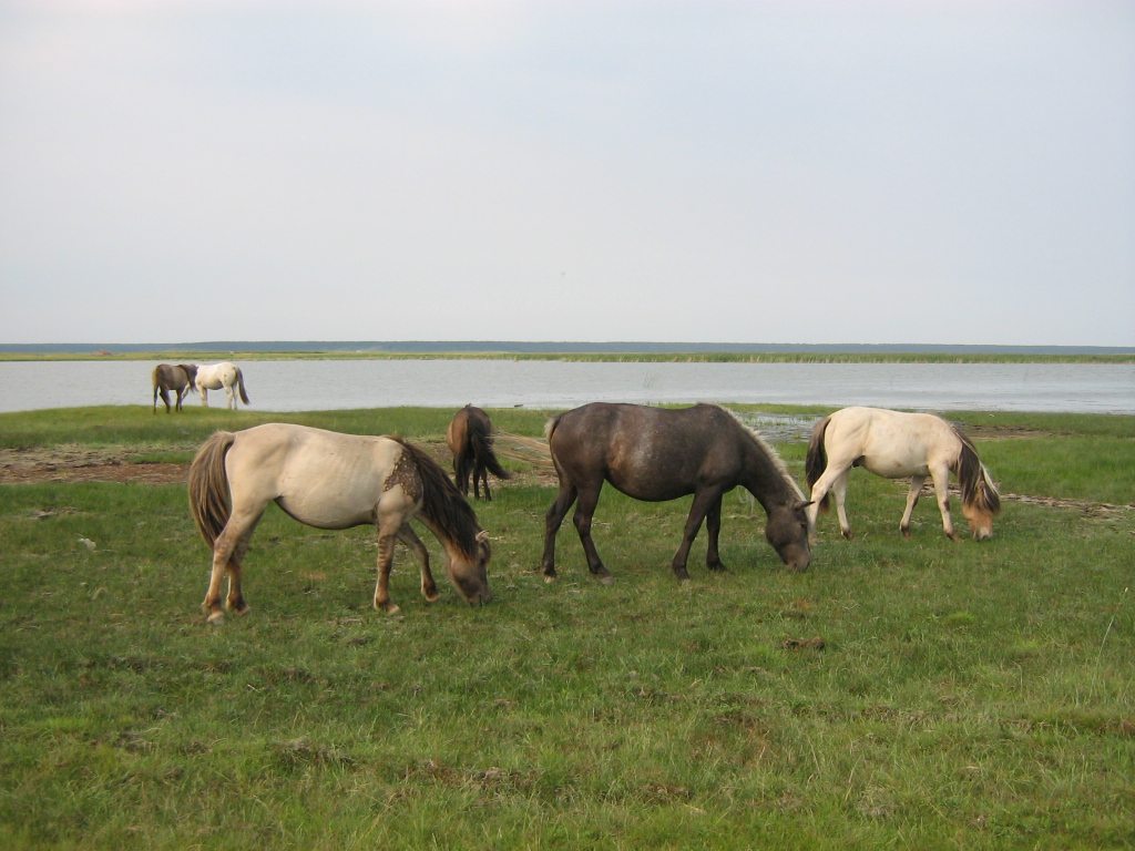 Лошади на берегу озера Мюрю, Усть-Алданский улус, Якутия